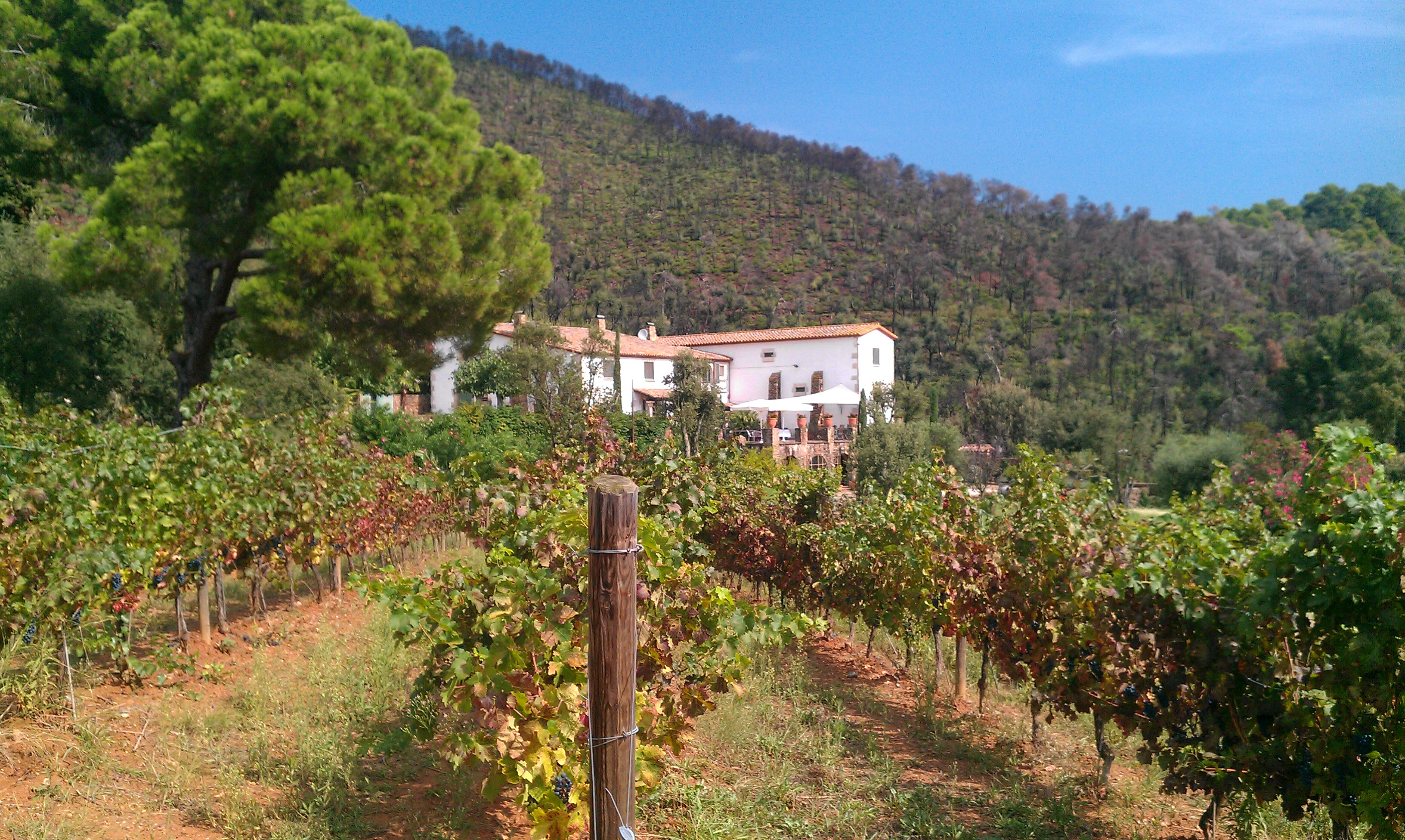 Vinyes de la Finca Bell-Lloc Palamós Baix Empordà Girona